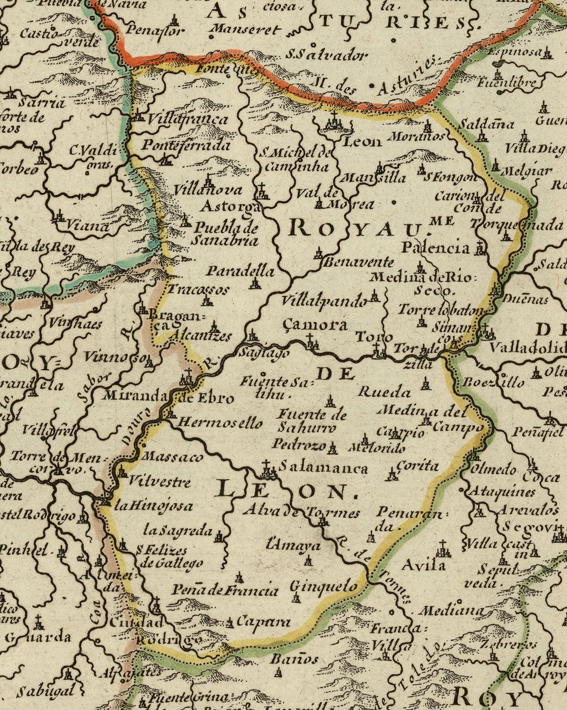 Detalle del Reino de León en el mapa "L'Espagne subdiuisée en tous ses royaumes, principtes., Seignries., &c. exactem. revüe, corrigée et augmentée dessus ce qui en a este veu jusques a present", realizado en 1665 por el geógrafo real francés Sr. Sanson.